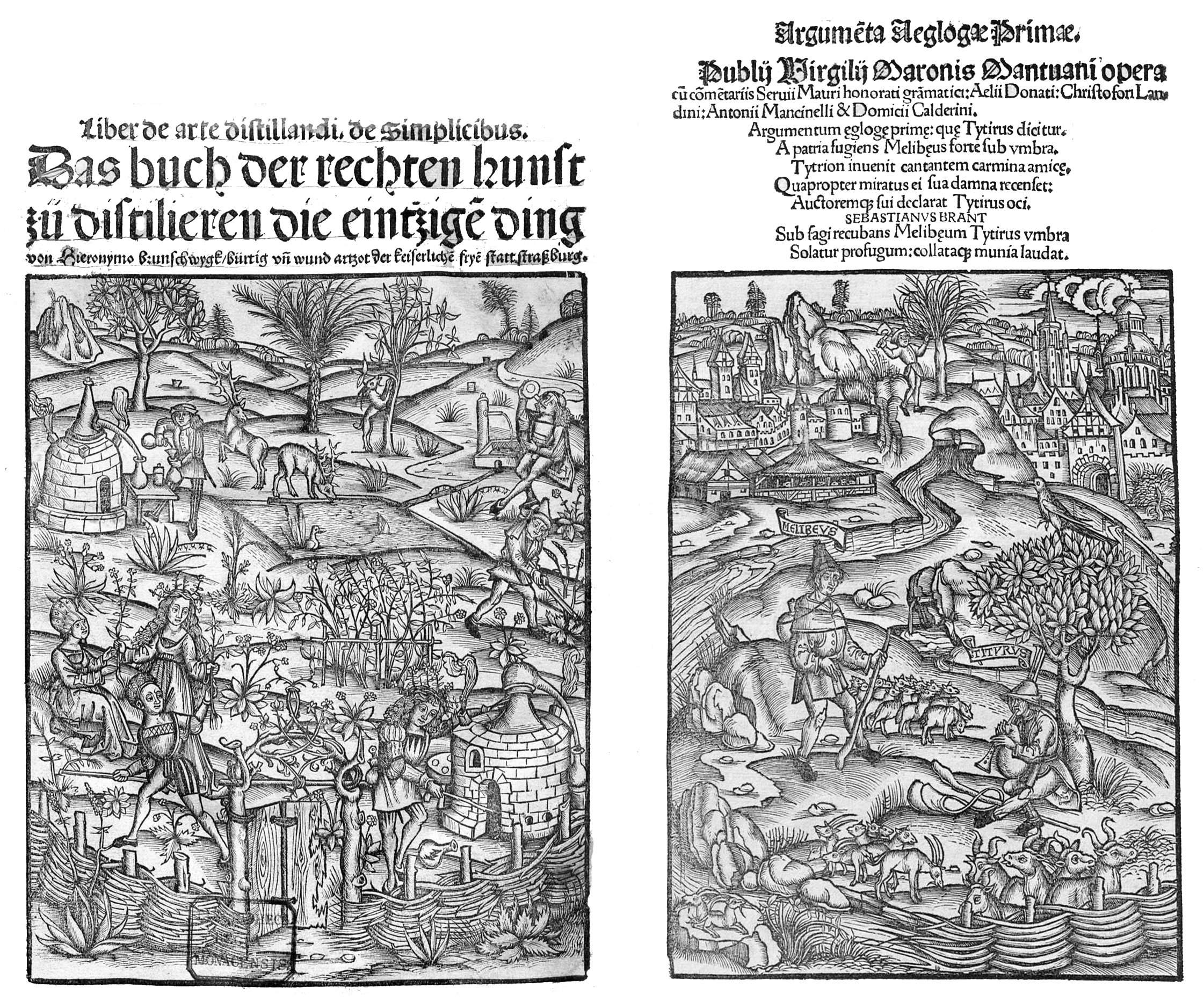 Titelblätter